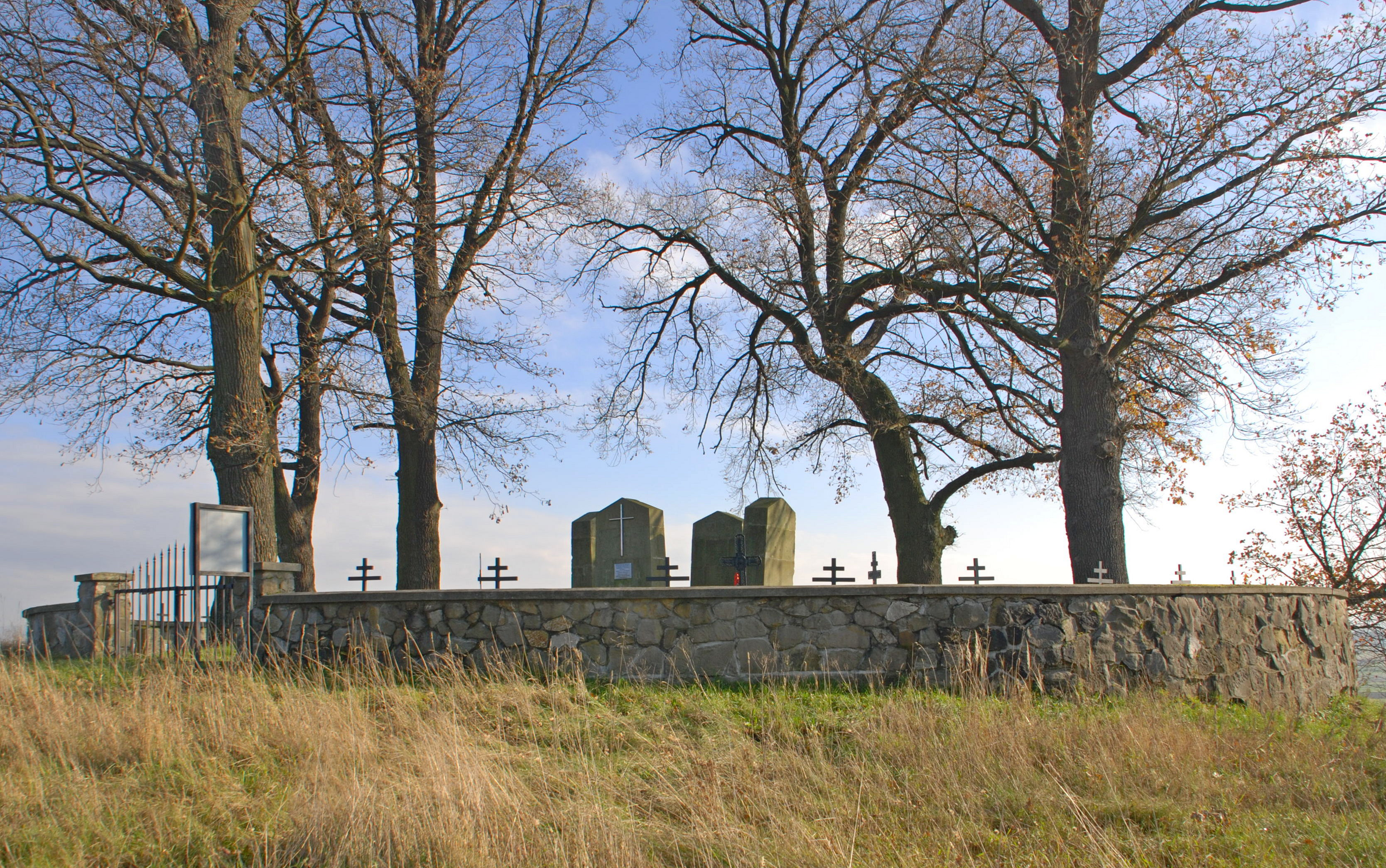 wieś Bierówka